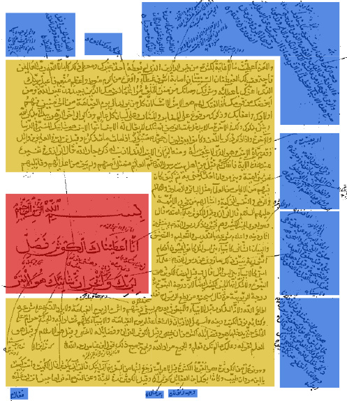 مازِرونی: گلکی قوران ِبخشون ِسیوا هاکردن